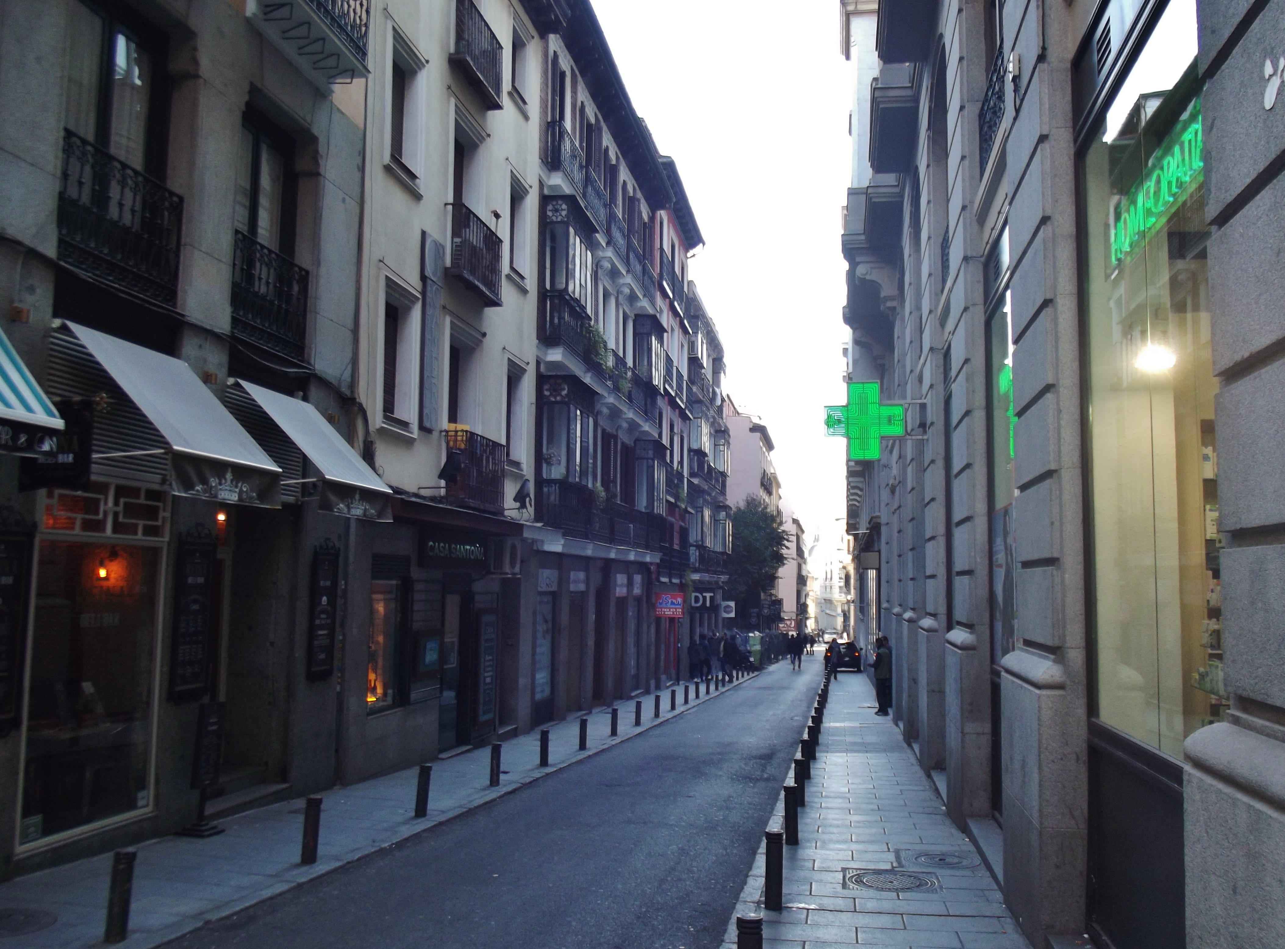 Calle de la Reina, Madrid.